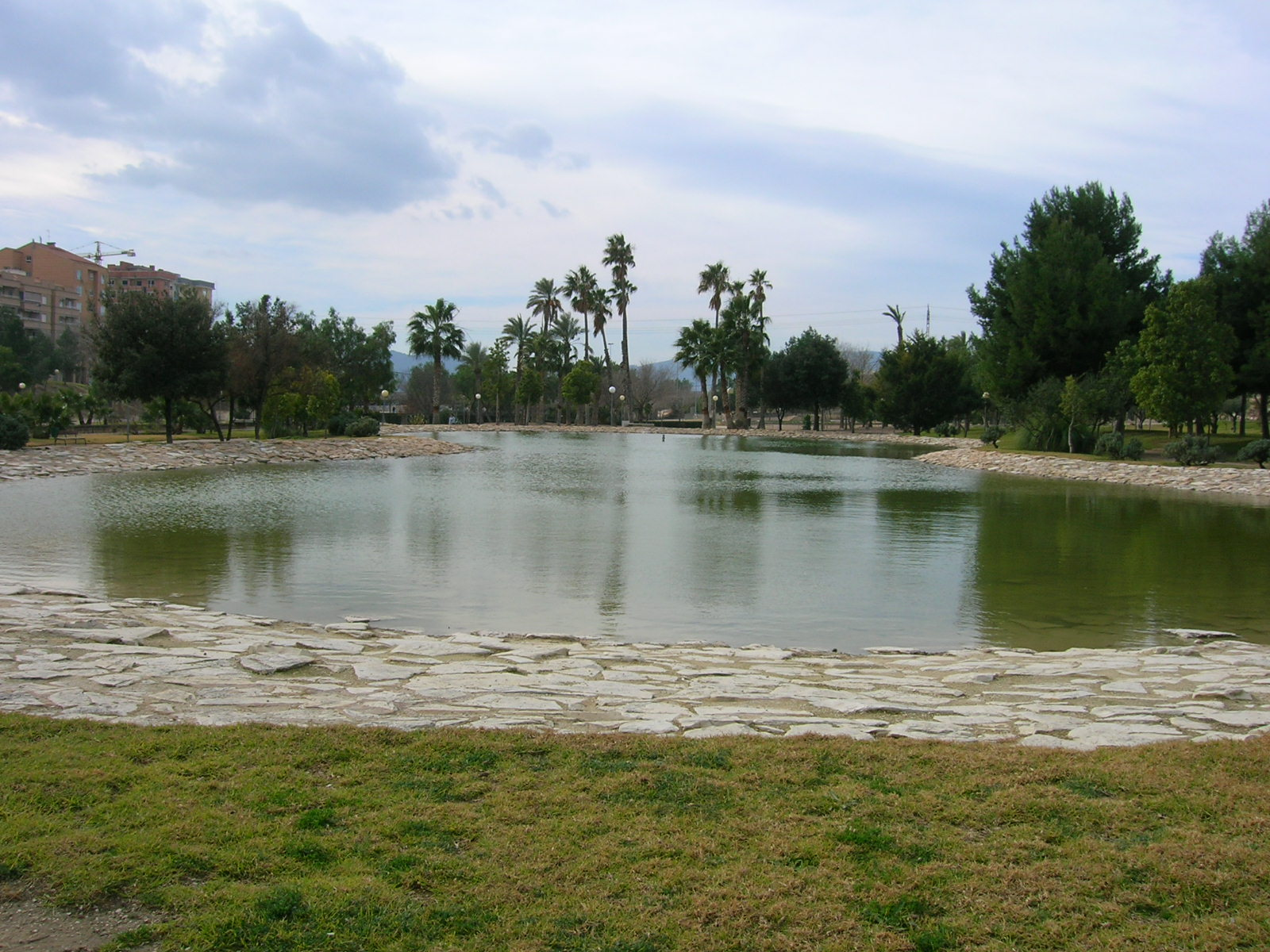 Lago de los Jardines del Vinalopo, Elda